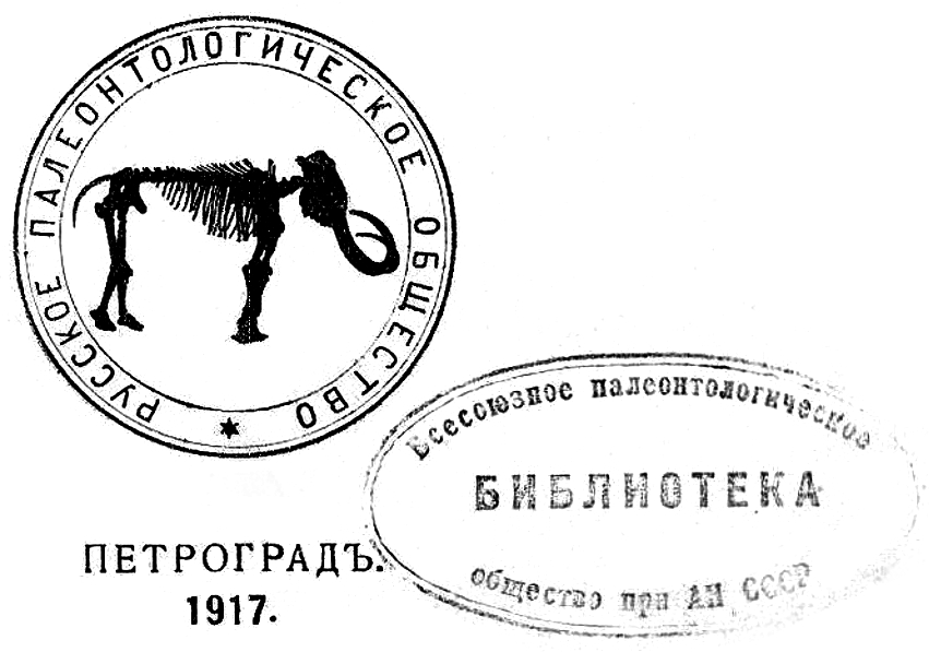 Логотип общества, 1916 и штамп библиотеки ВПО АН СССР